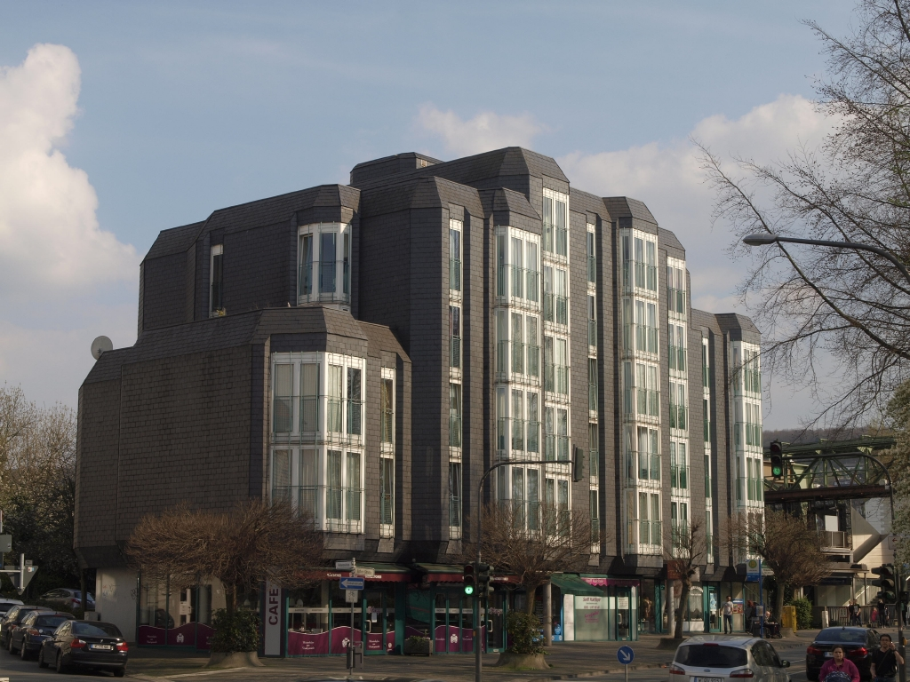 Geschäfts- Wohngebäude Loher Straße 34-30 in Wuppertal, Quartier Friedrich-Engels-Allee.